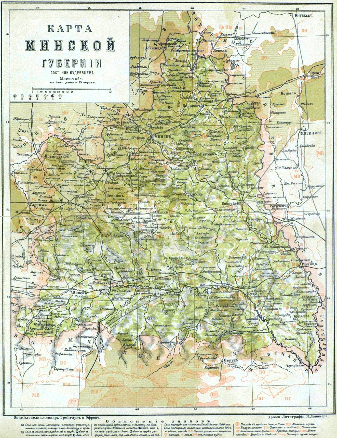 Карта Минской губернии 1896 года. Масштаб в англ. дюйме 45 вёрст.